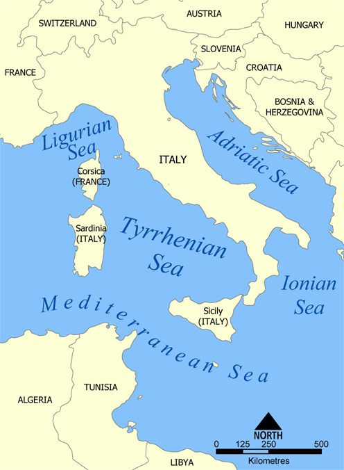 Il Mar Tirreno A map showing the location of the Tyrrhenian Sea. Created by NormanEinstein, May 19, 2005.